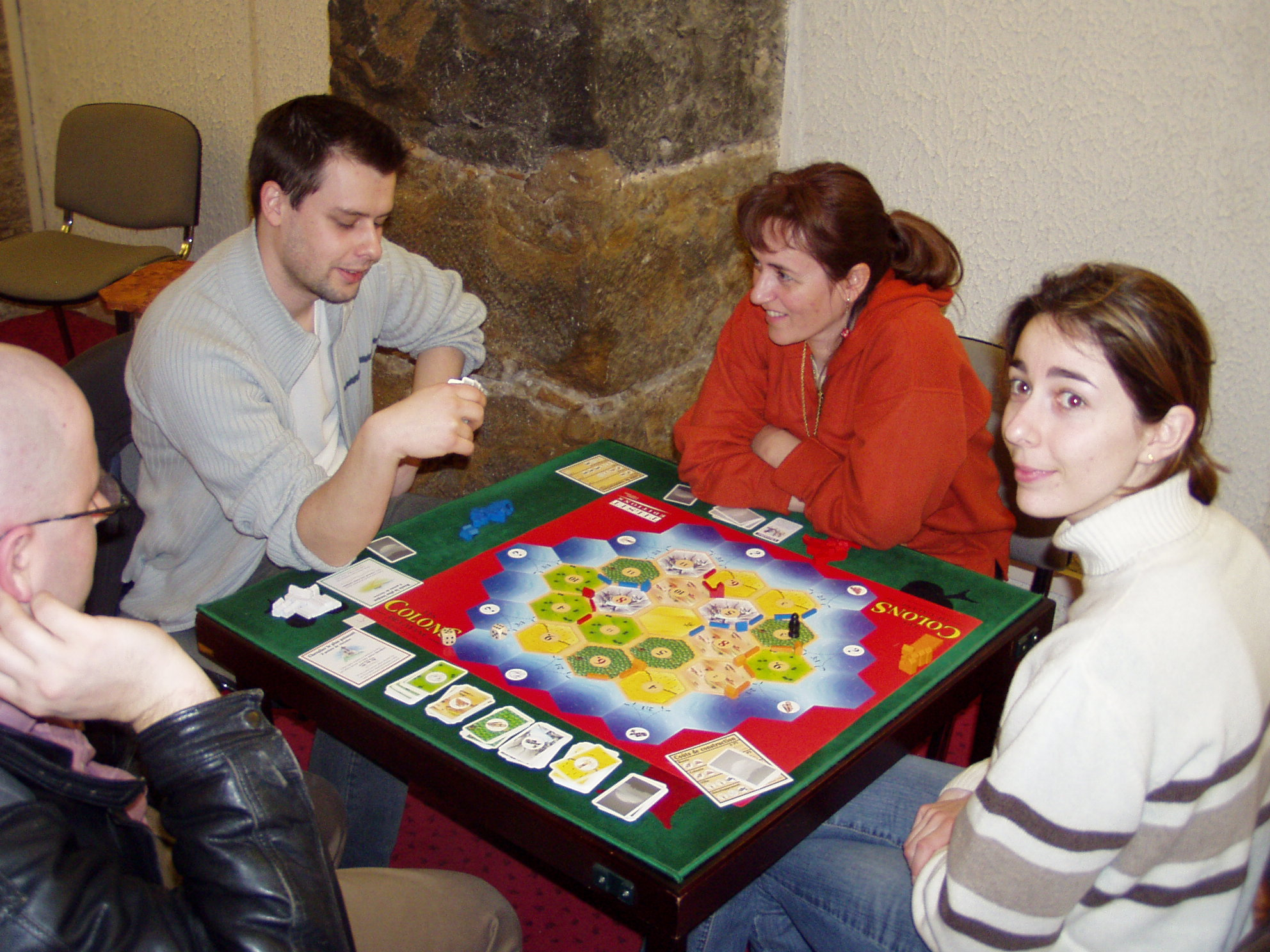 Les Colons de Catane, en championnat à Lyon.